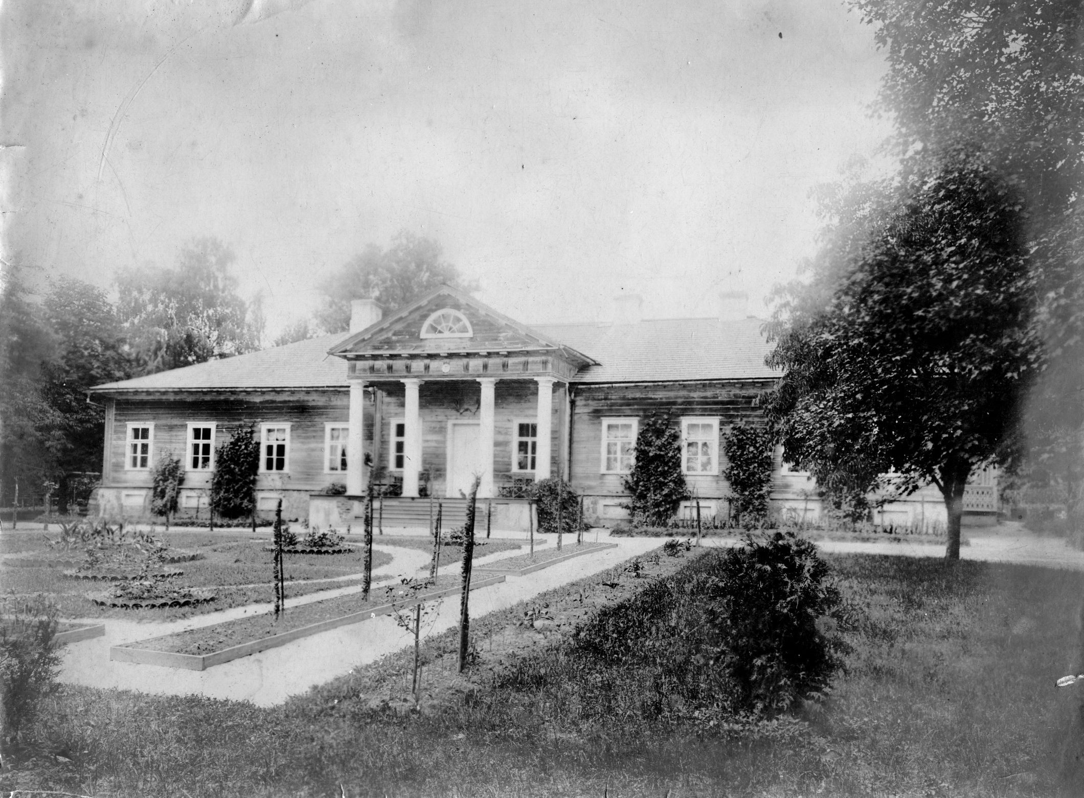 Беларуская (тарашкевіца): Задзьвея (Zadźvieja), сядзіба Чачотаў (Čačot)